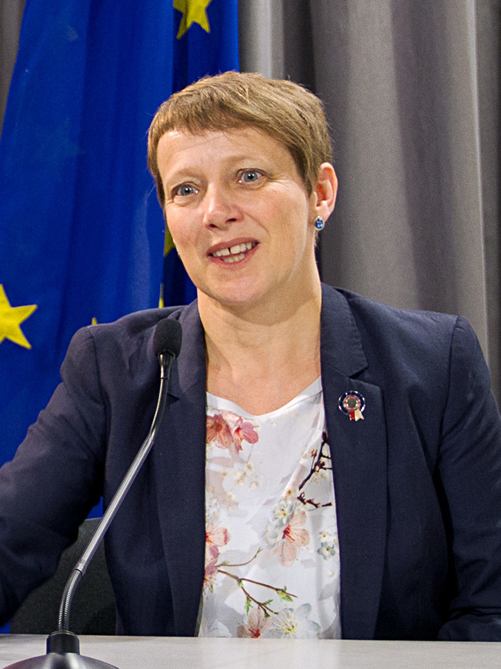 05-May-2017 Visita al Peñón de la eurodiputada por #Gibraltar Clare Moody